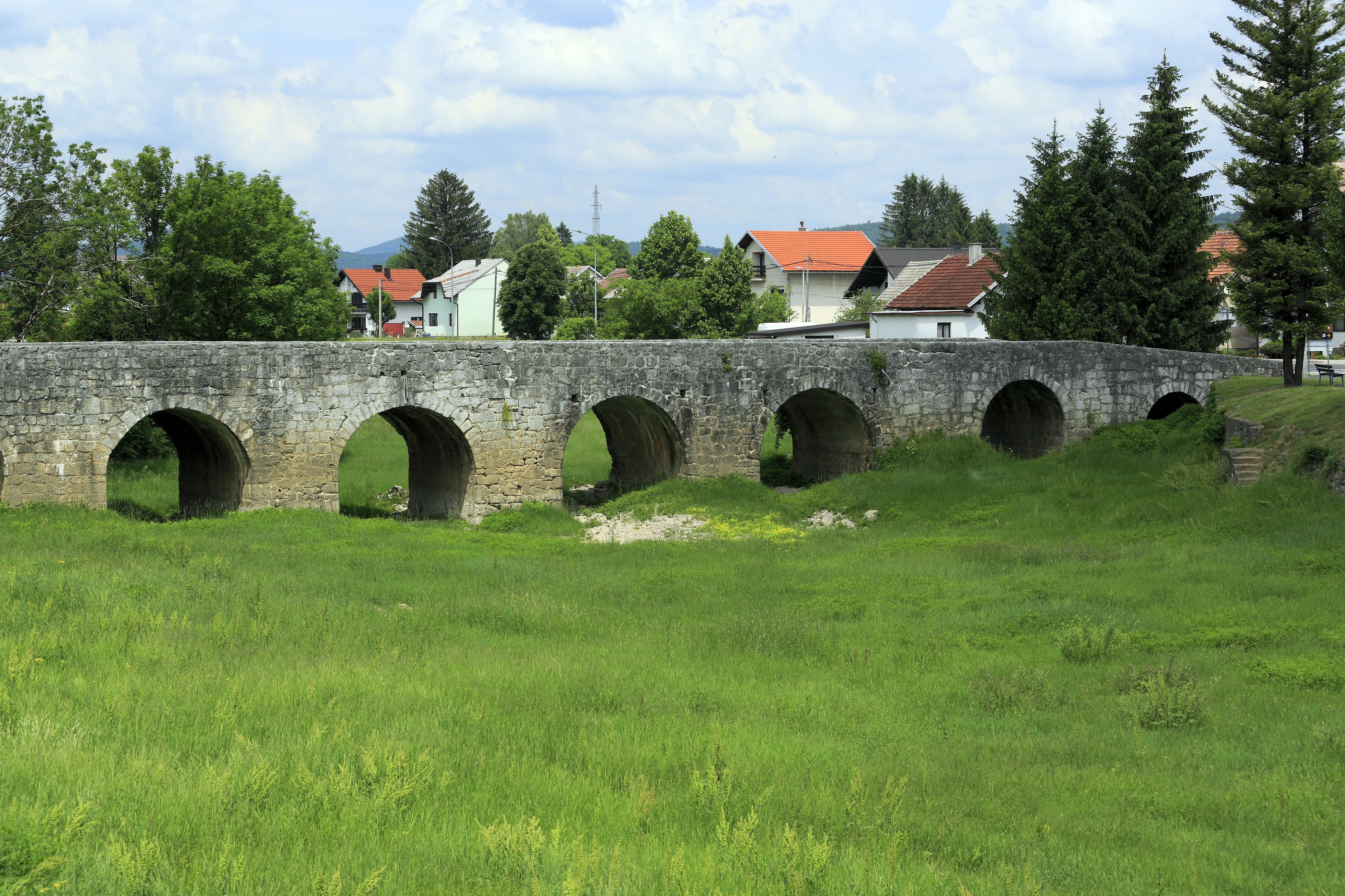 Eine alte Straßenbrücke im Ortsgebiet von Oštarije über den Karstfluss Zagorska Mrežnica, der zum Aufnahmezeitpunkt kein Wasser führt. Kamerastandort ist die neue Straßenbrücke der D42 Stubica–Grabovac. Die geraden Pfeiler zeigen auch ohne Wasser, dass diese Seite die Unterstromseite ist.